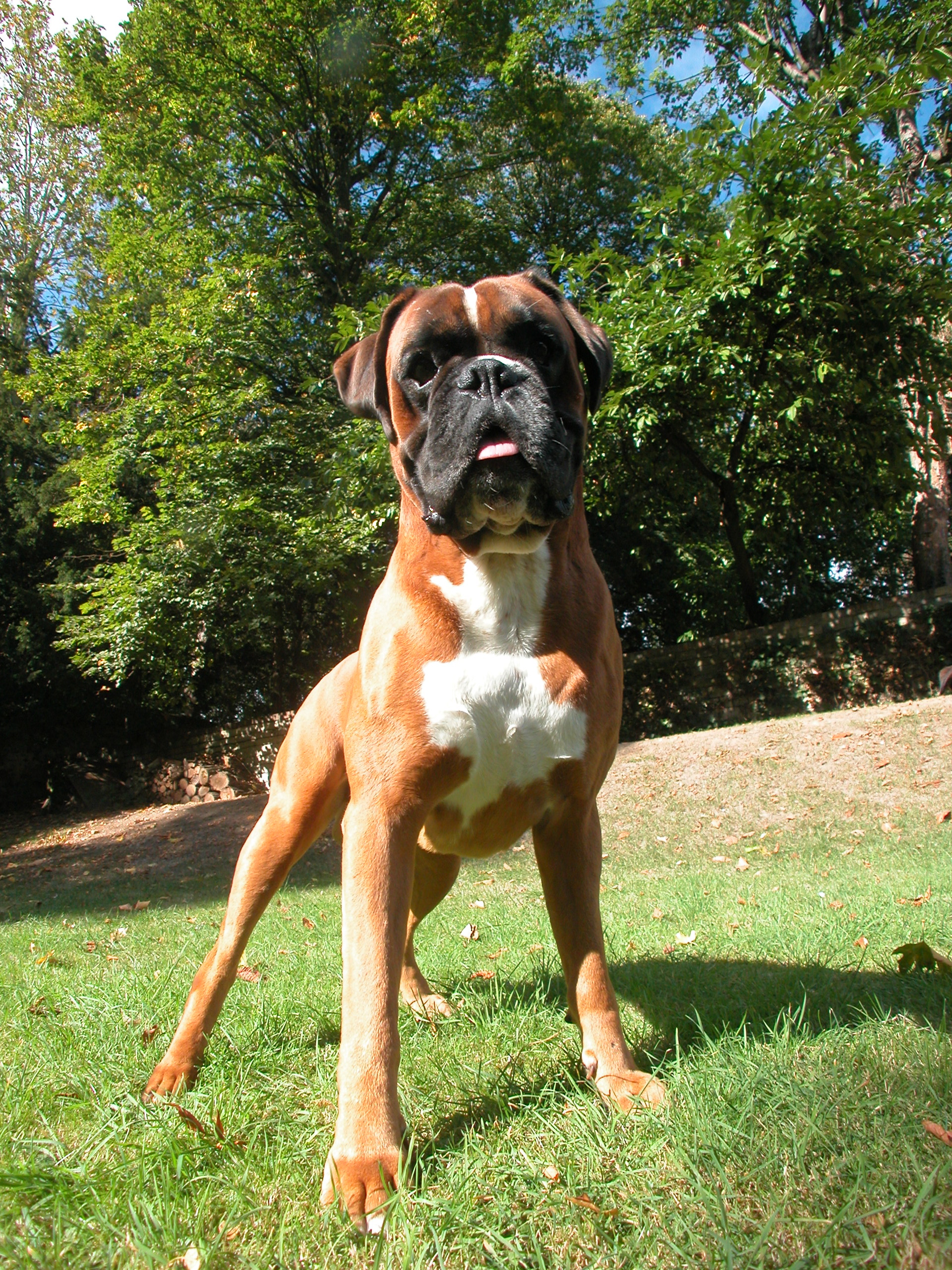 Boxer